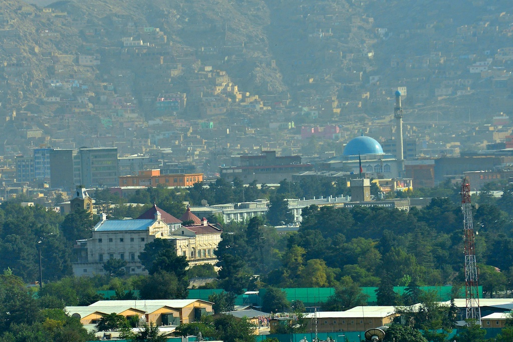 Presidential Palace